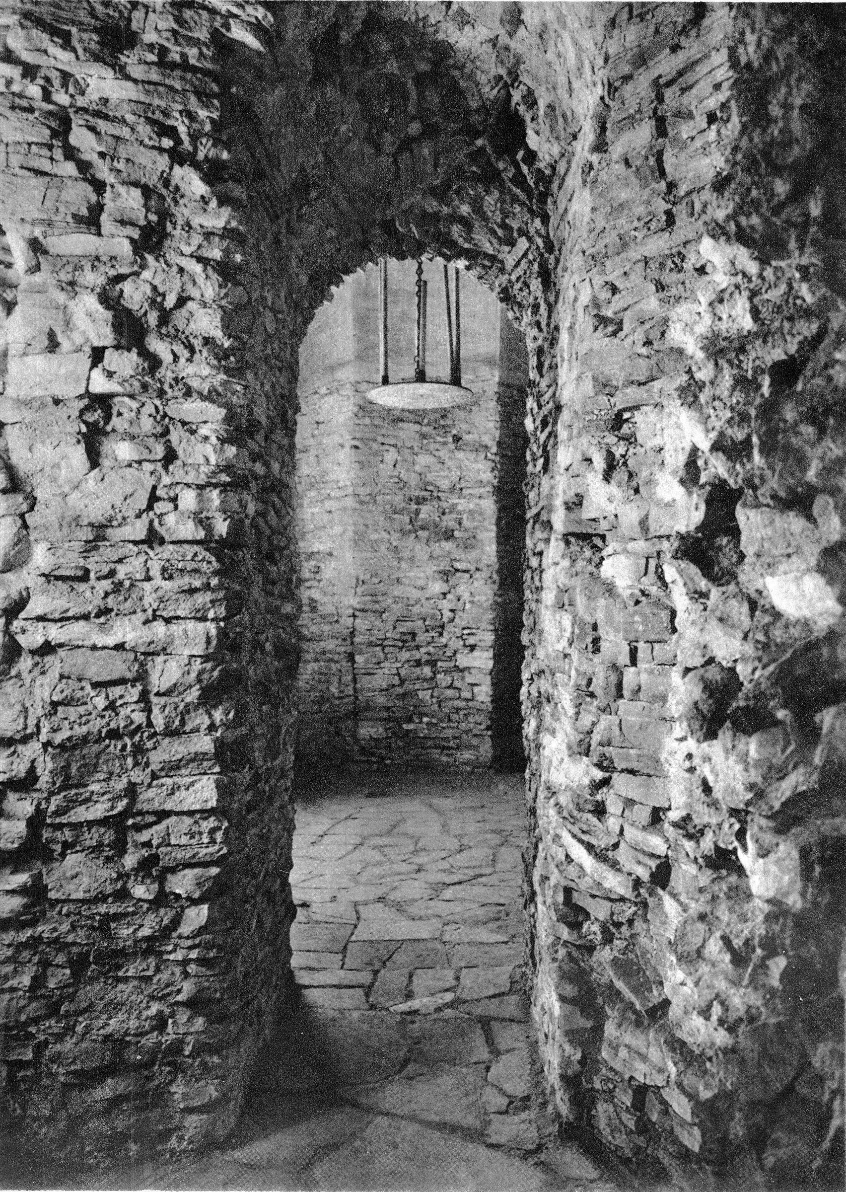 Rotunda świętych Feliksa i Adaukta na Wawelu